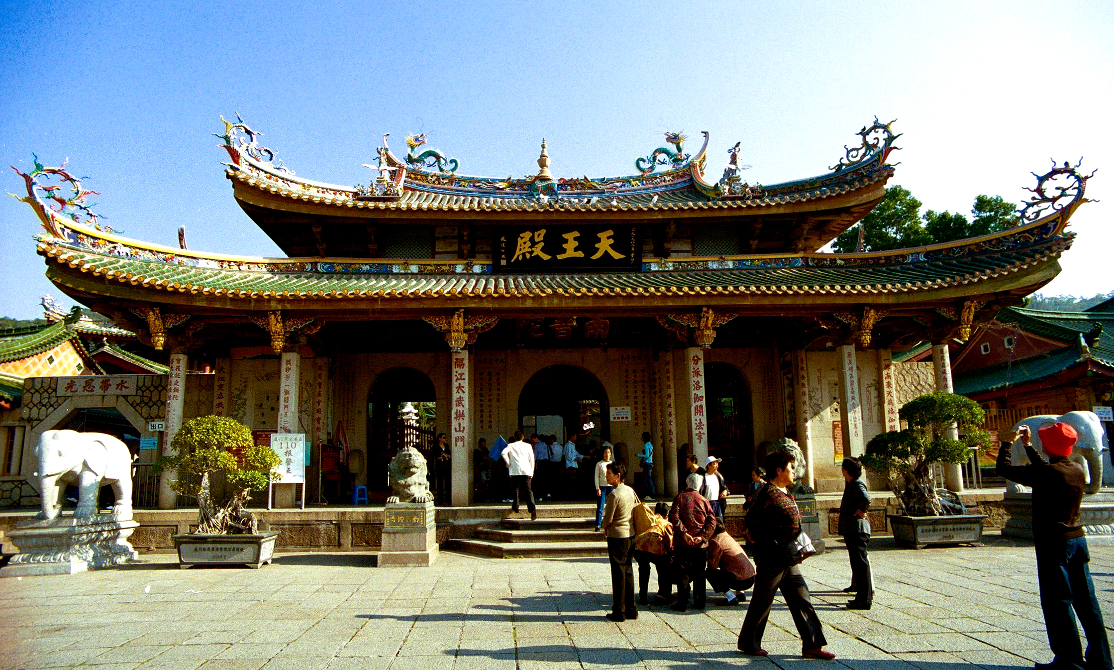 Tianwangdian, Nanputuo temple南普陀寺天王殿